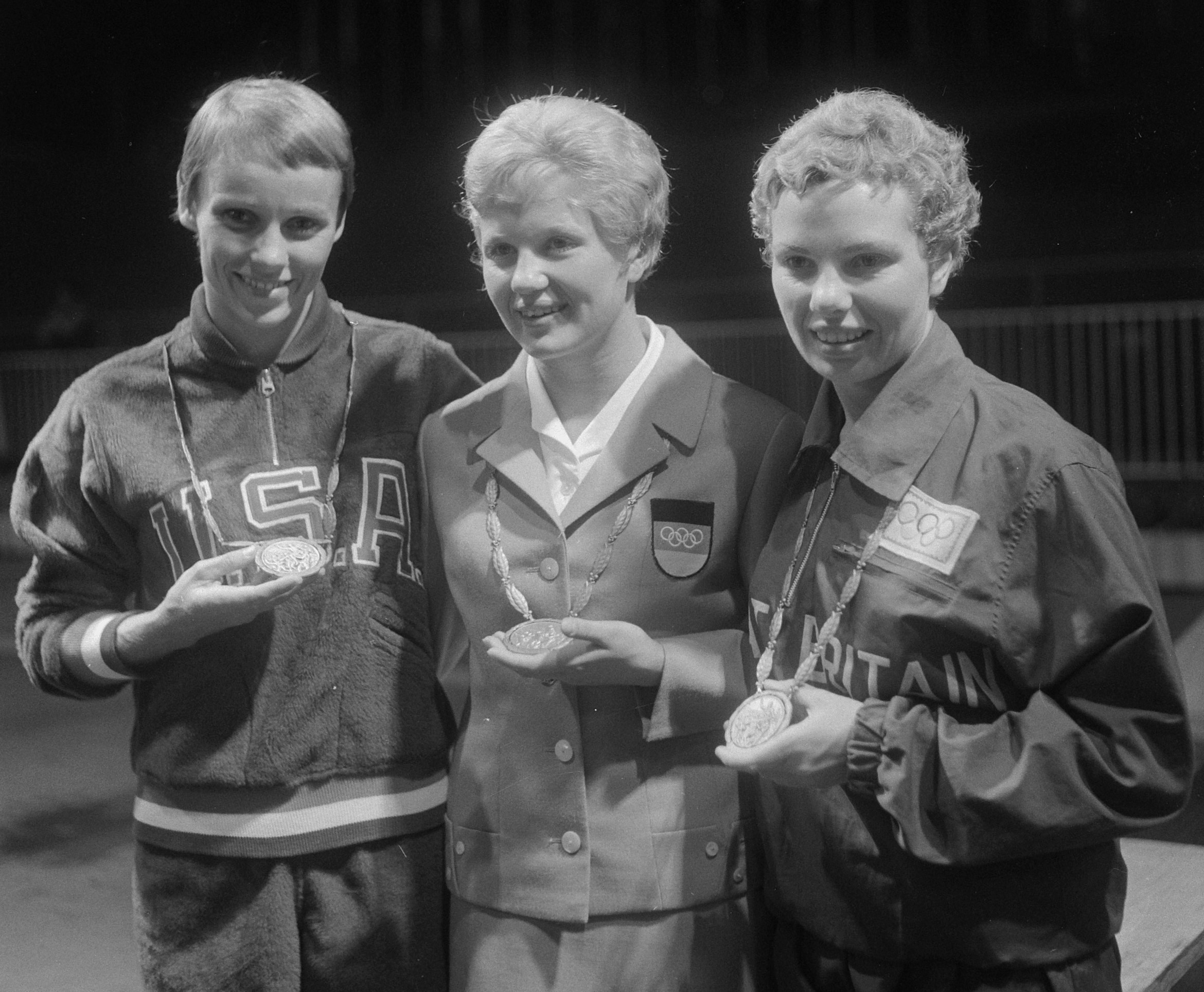 Olympische Spelen te Rome, prijswinnaressen 3 meter plank schoonspringen v.l.n.r. Paula Pope (USA), 2e, Ingrid Krämer (Dld) 1ste en Elisabeth Ferris (GB) 3de